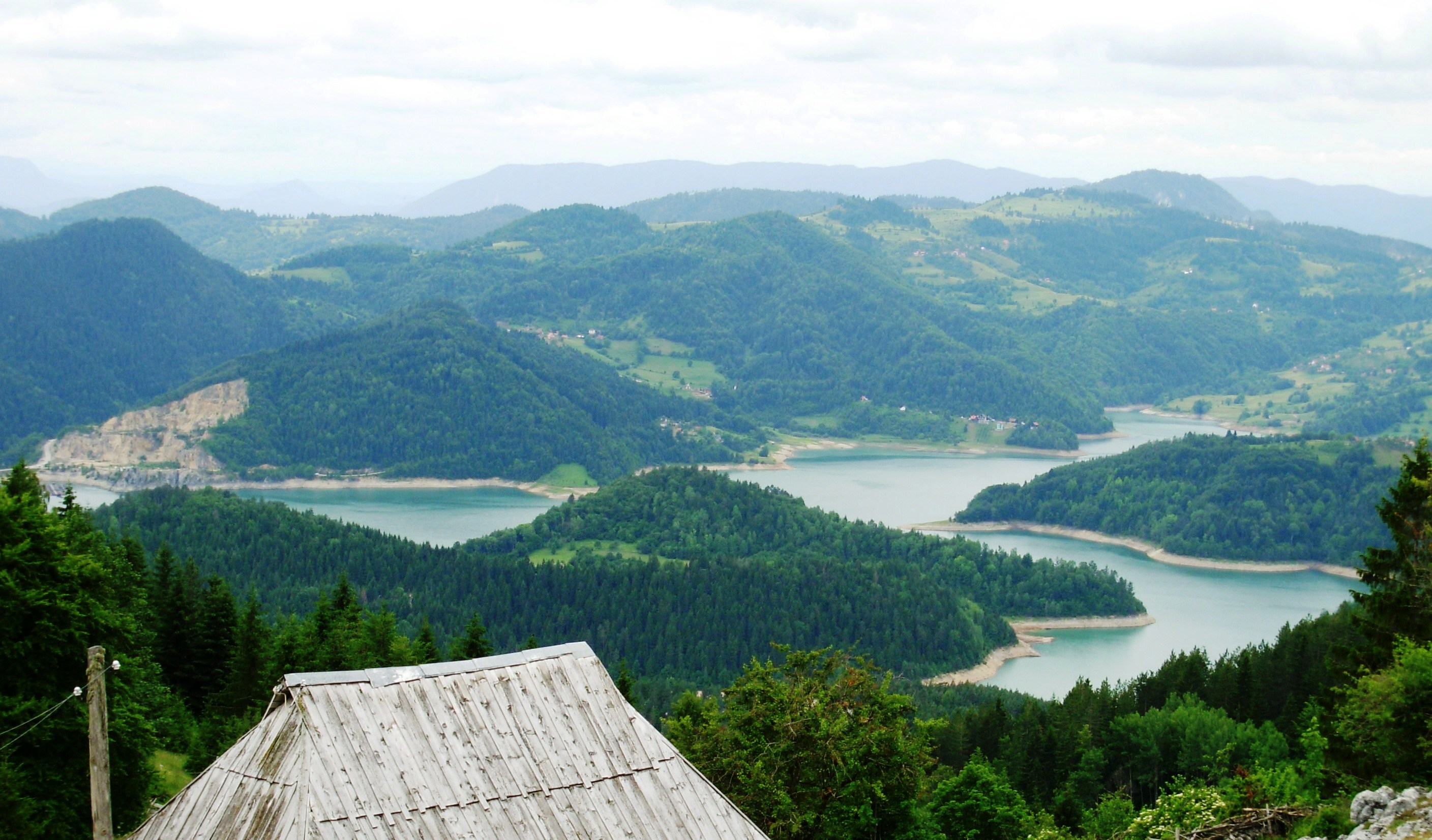 Језеро Заовине, поглед са Секулића вода са око 1200 мн/м. Језеро је на нешто испод 900 м. Сликао Голдфингер